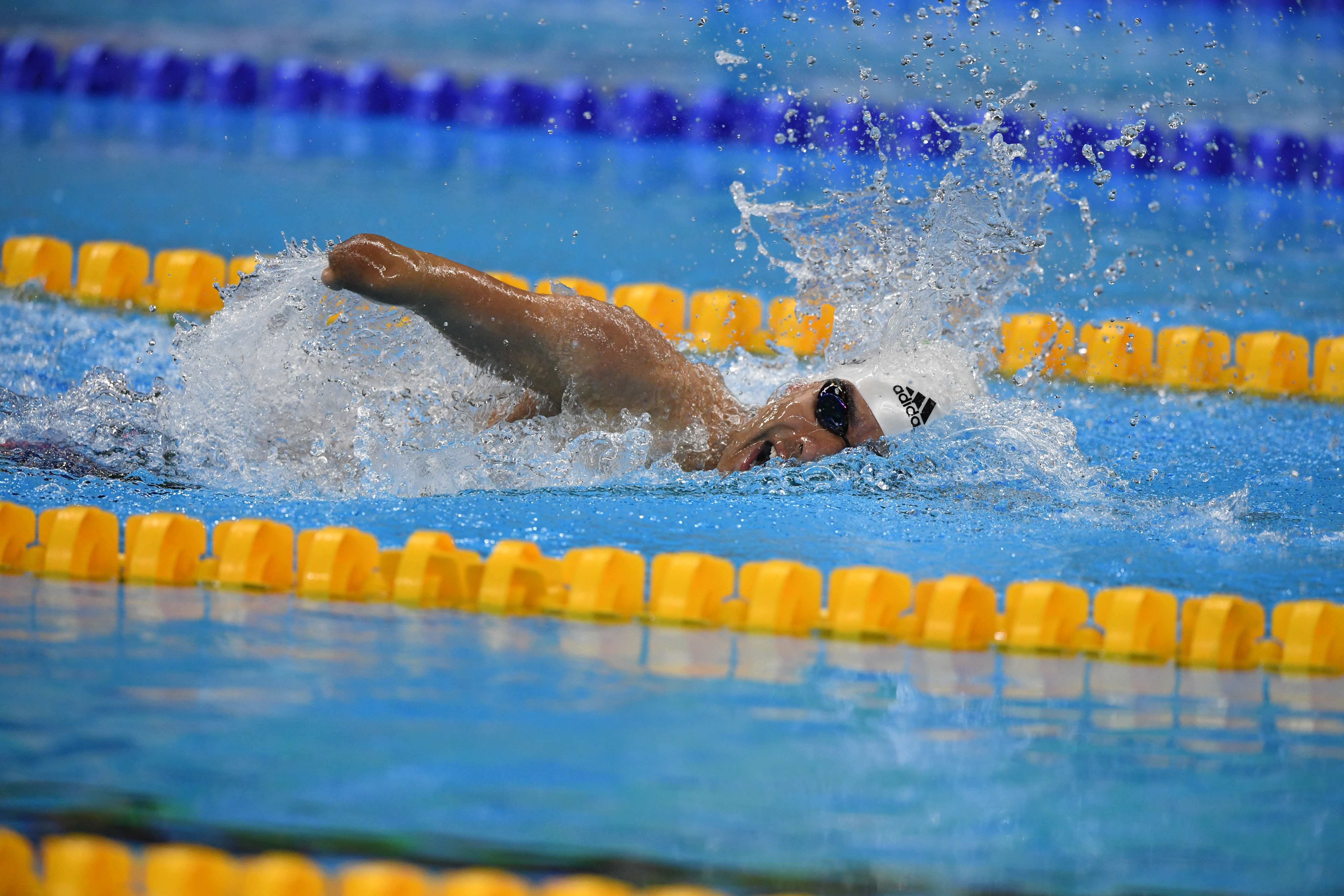 Rio de Janeiro - Daniel Dias conquita o ouro nos 100m livre S5 das Paralimpíadas Rio 2016 (Tânia Rêgo/Agência Brasil)